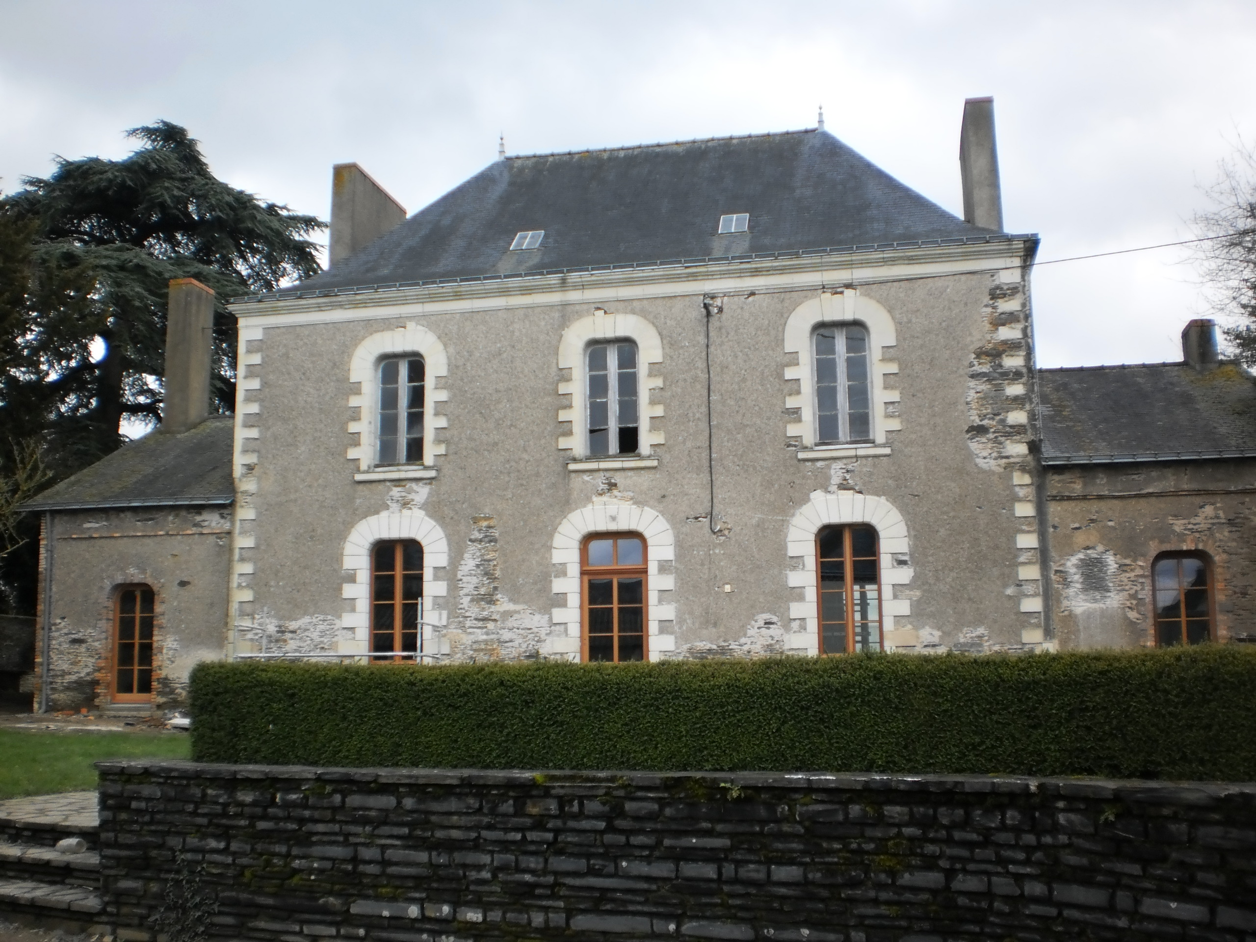 Petit-Auverné (Loire-Atlantique, France) - manoir de la Renaudière